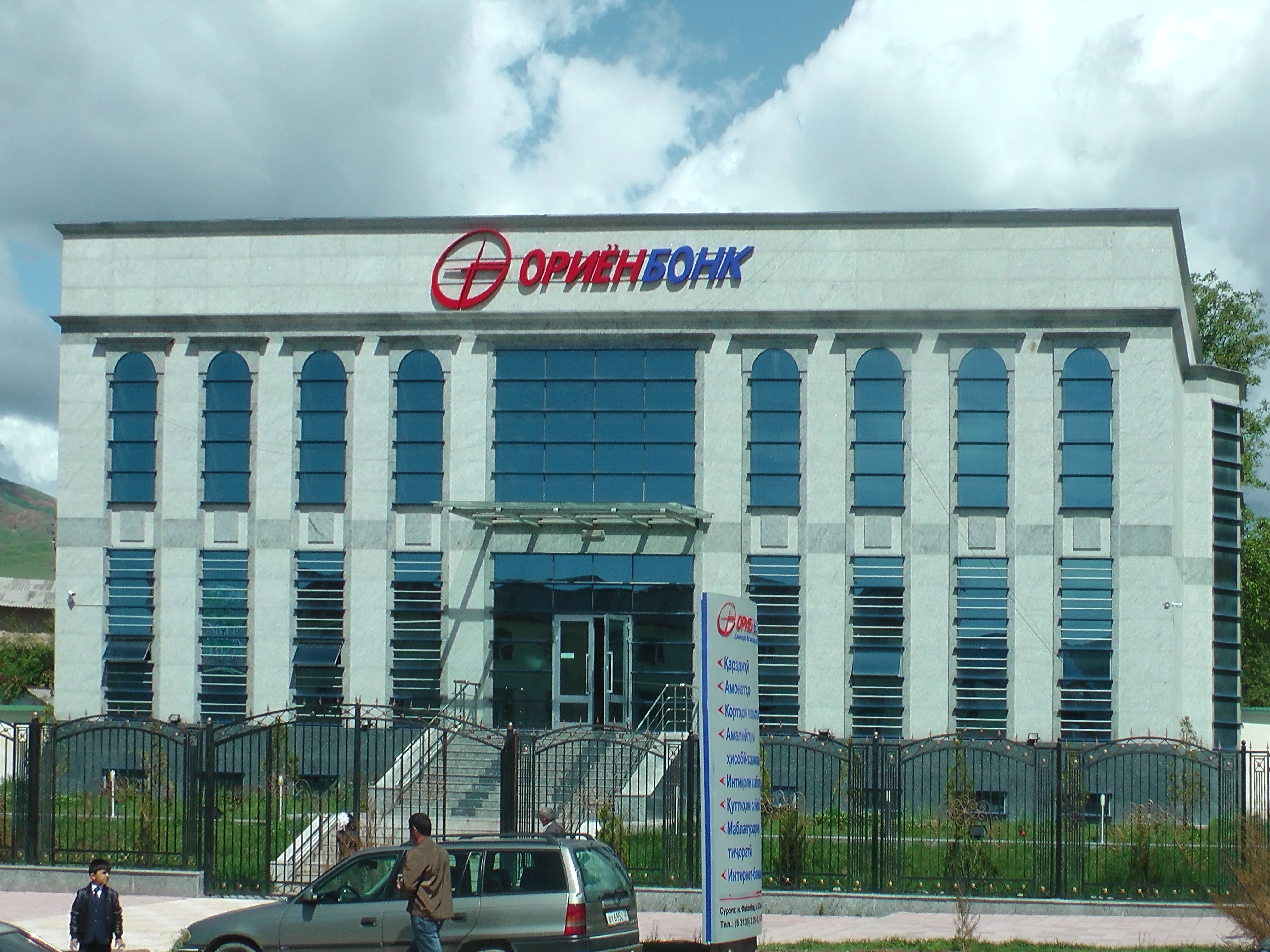 Тоҷикӣ: Бинои Филиали ҶСК "Ориёнбонк" дар ноҳияи Файзобод